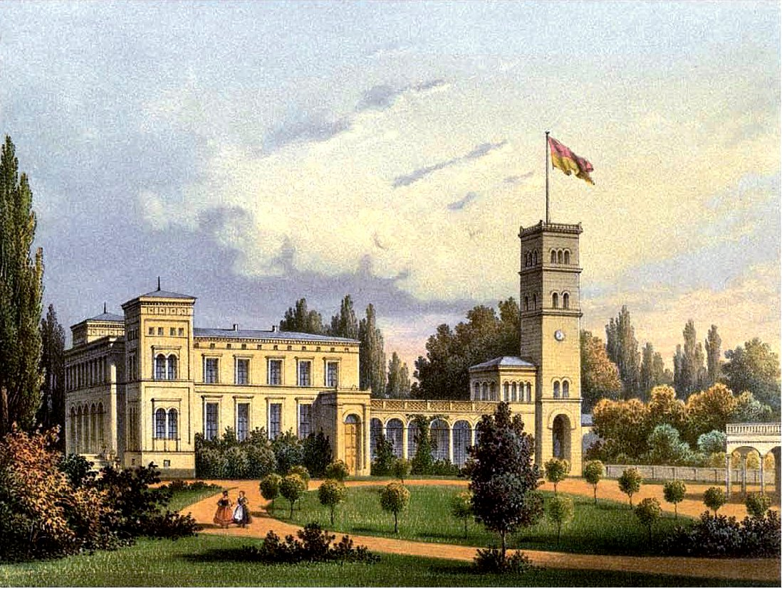 Gut Strelitz, Kreis Chodziesen, Provinz Posen